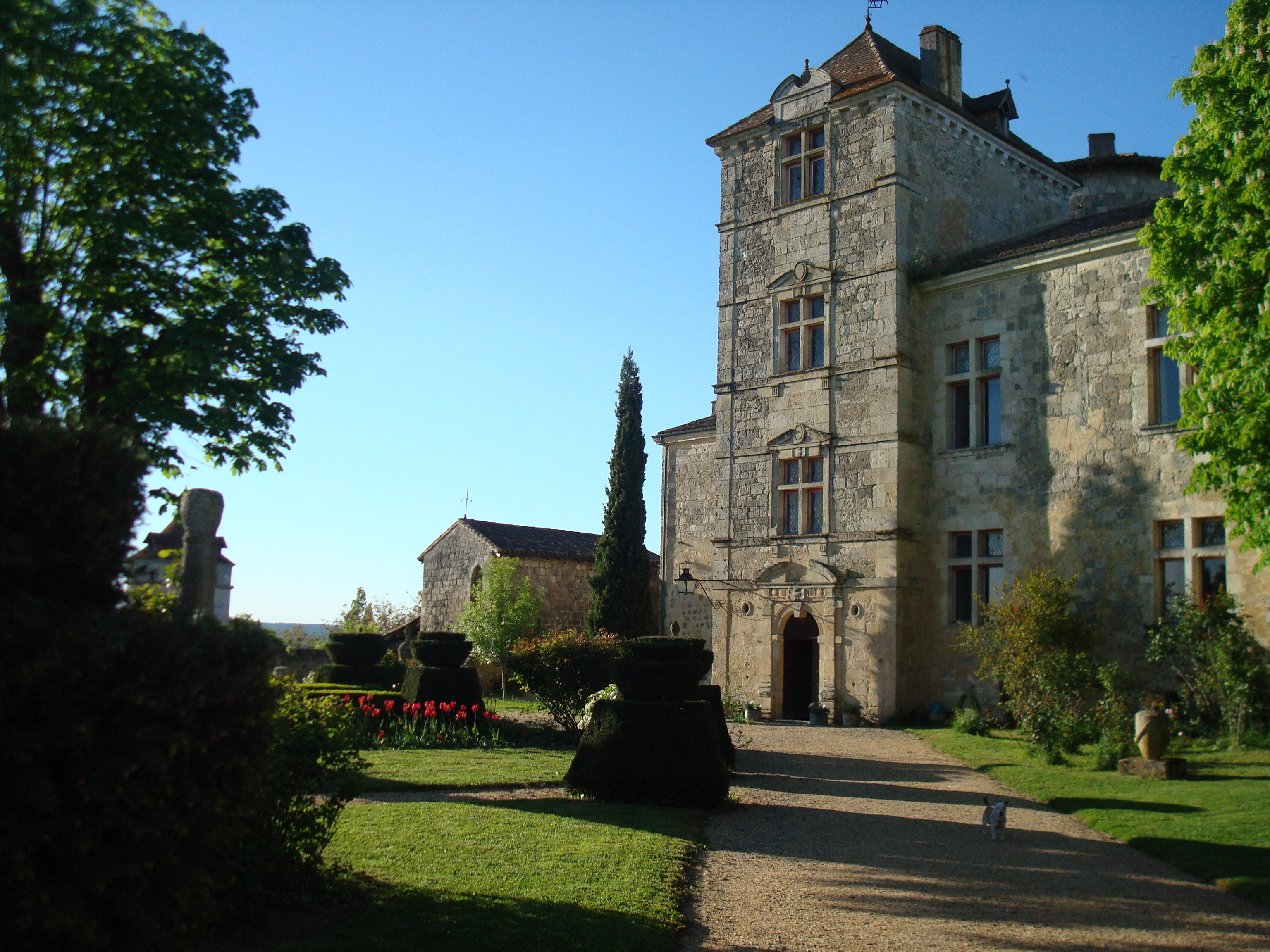 Château de Fréchou